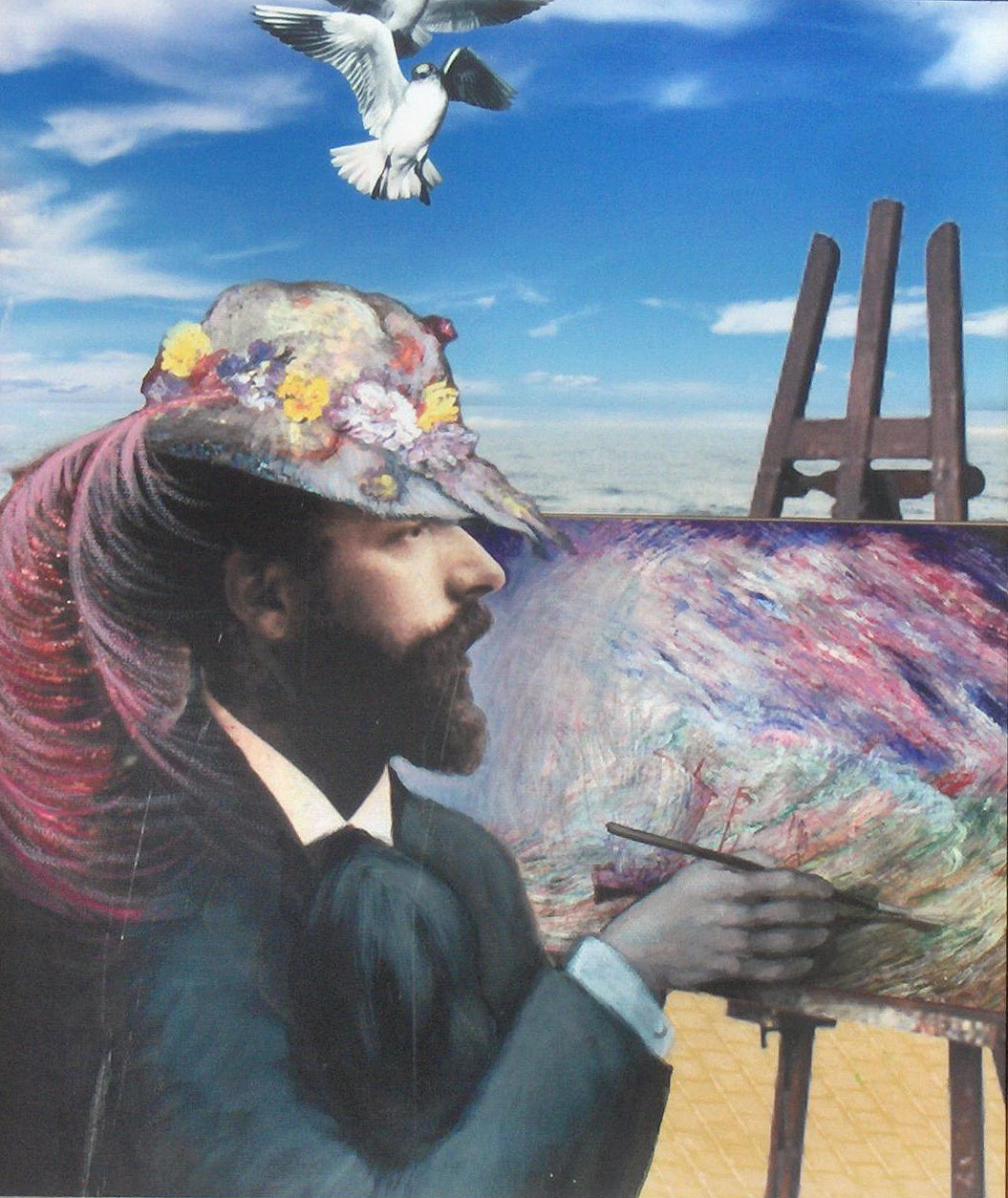 "Ensor met bloemenhoed - hulde aan James Ensor" Project "Van koning tot koningin" - Trompe l'oeil 2006 Victorialaan, Oosteroever, Oostende, België 1000 x 3500